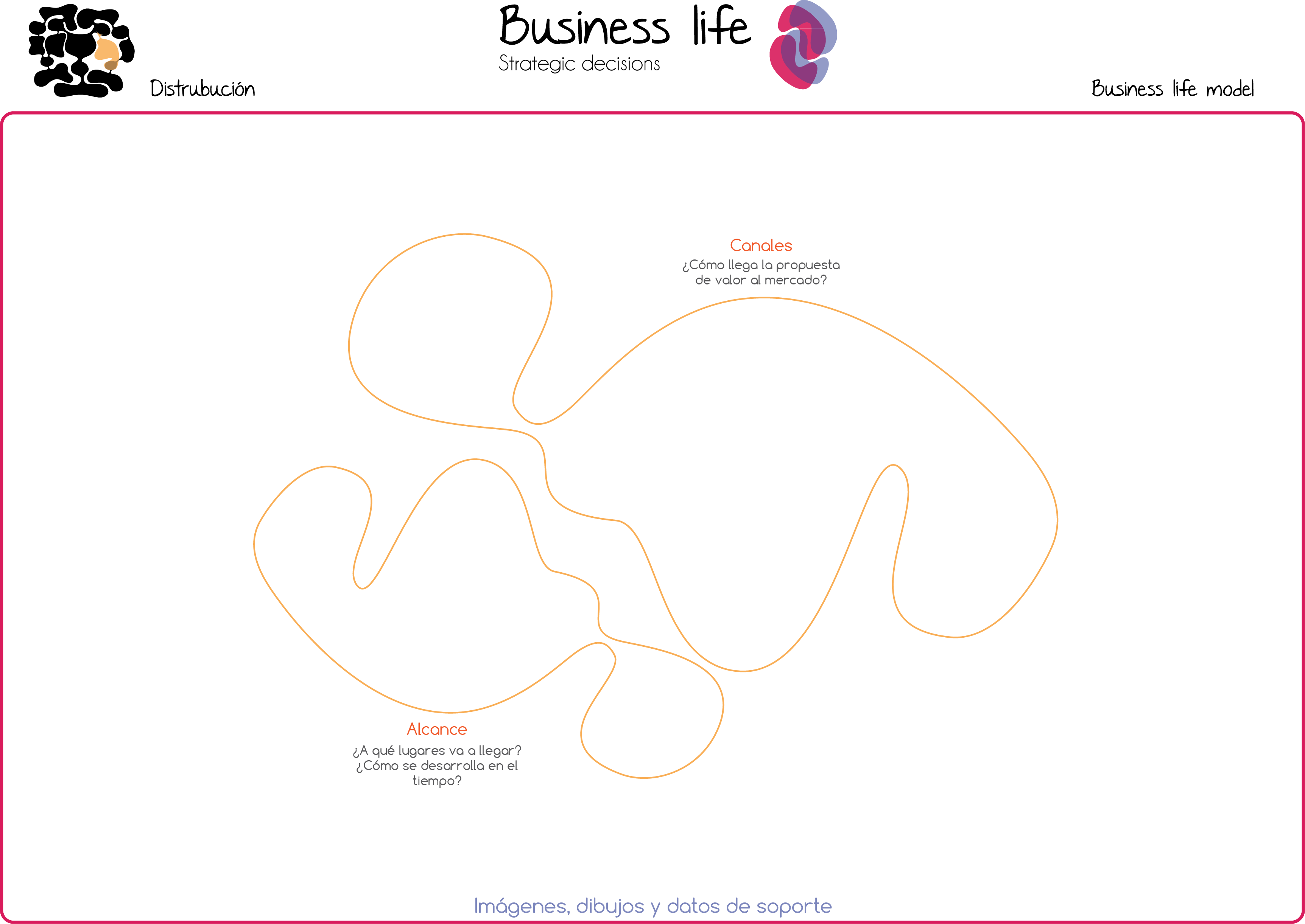 Herramienta para realizar planeación de distribución en el modelo de negocio. Aspectos de distribución en estrategias de negocio. (Business life model) (Modelo de negocio Business life)